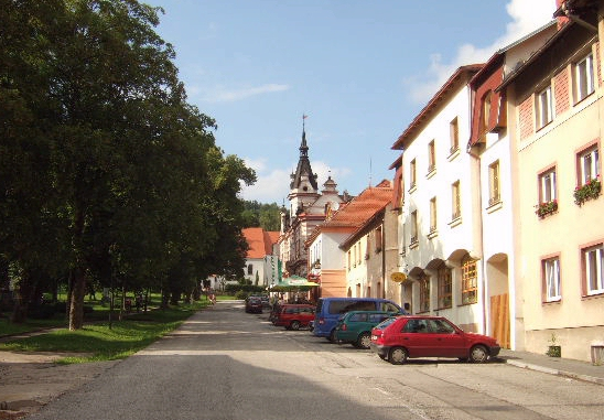 Horní Planá: Zentrum (2009)